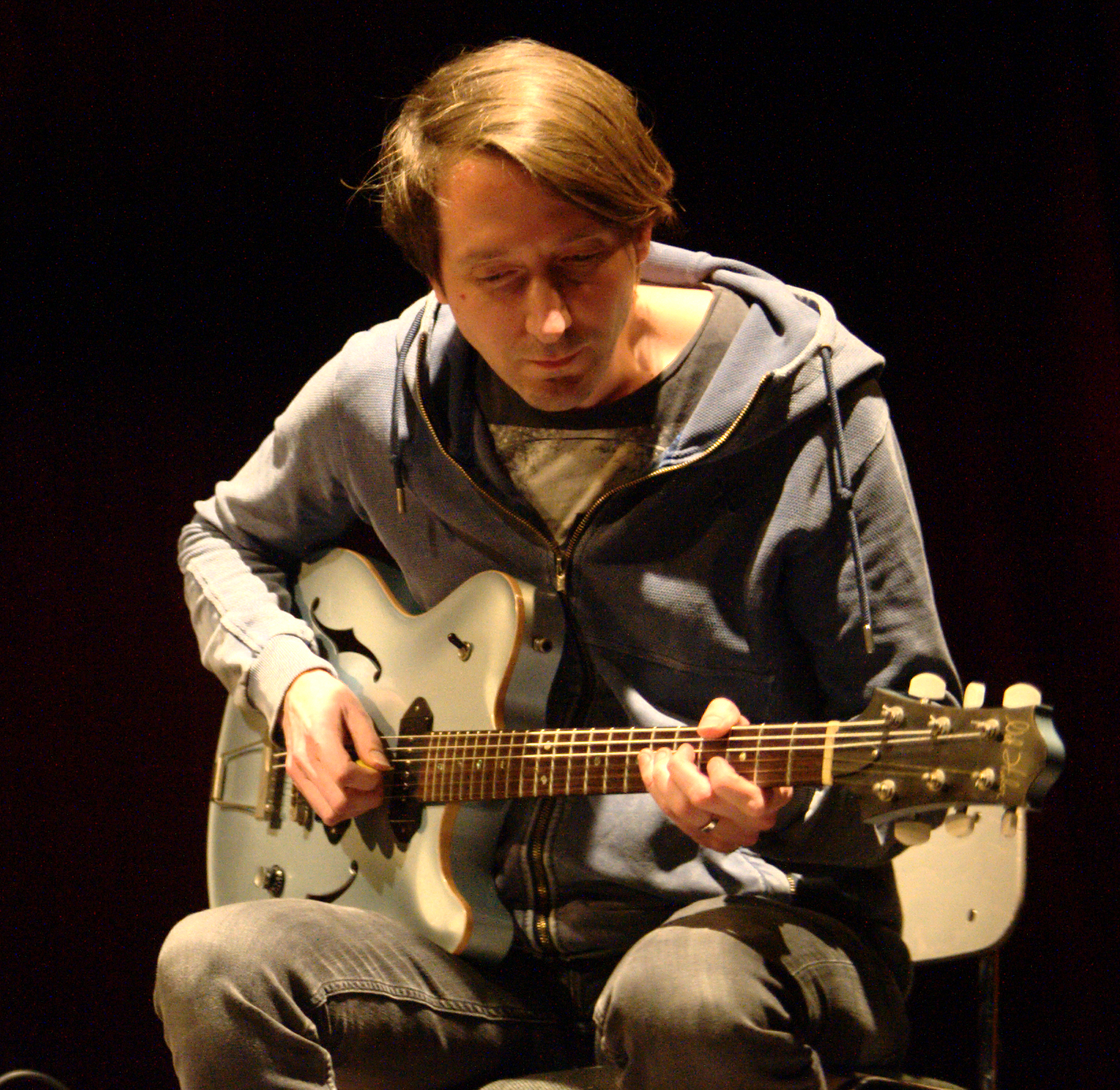 Hanno Busch im Konzert mit seinem Duopartner Oliver Leicht im "Rind" in Rüsselsheim am 15. Januar 2017